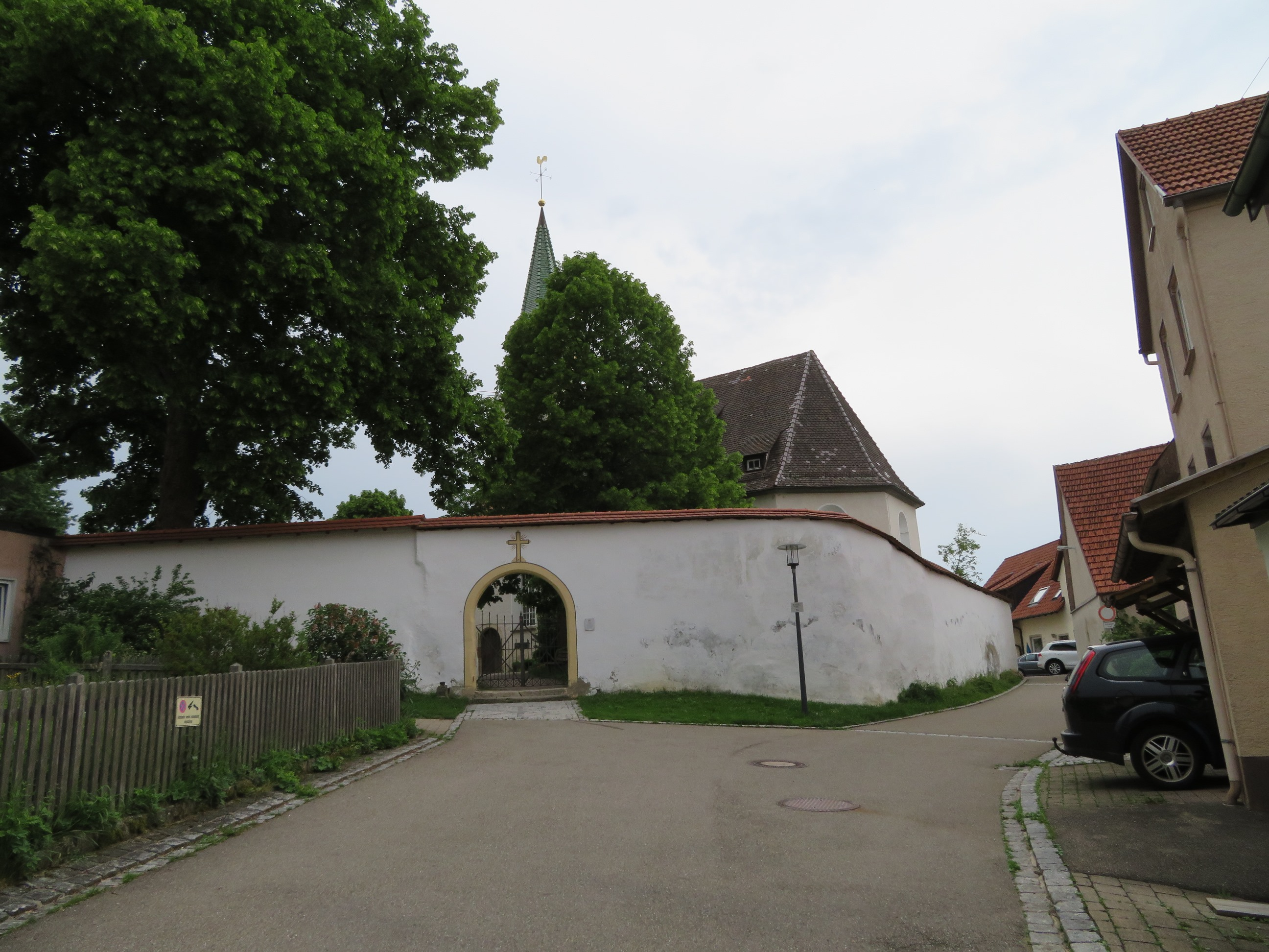 Blick zur Kirche St. Martin in Gomadingen